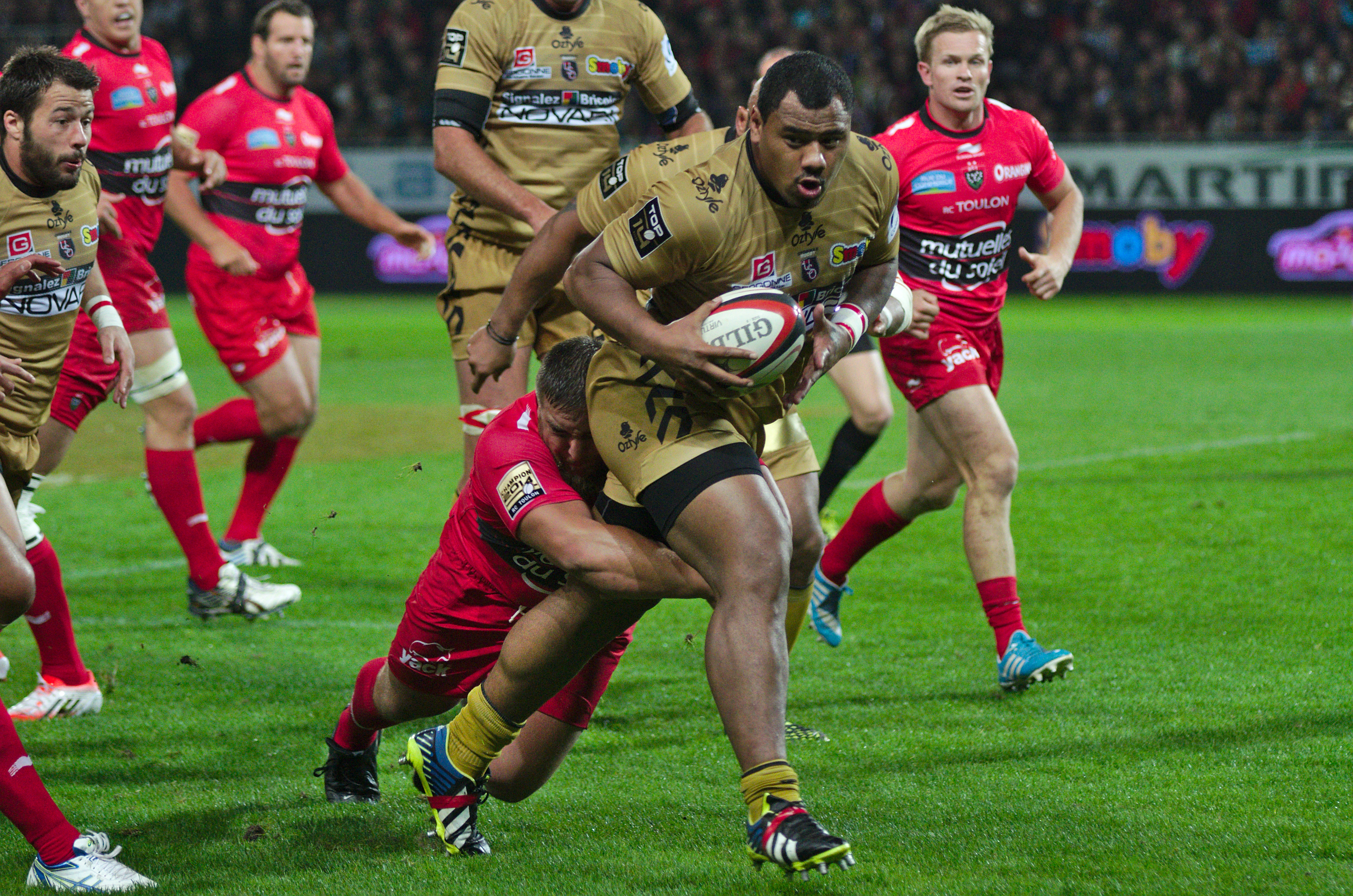 USO-RCT - 20141003 - Plaquage de Xavier Chiocci sur Paula Ngauamo